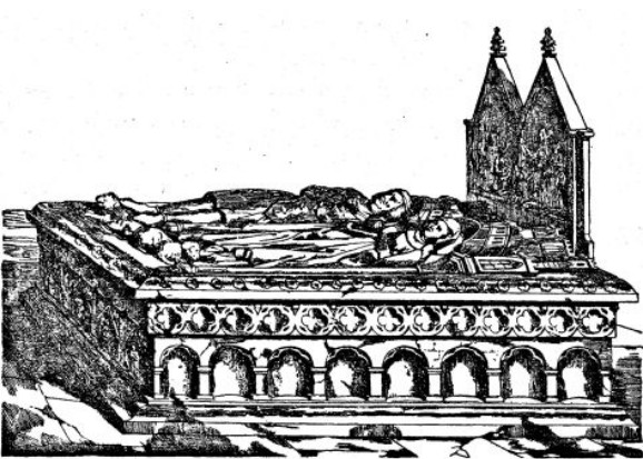 Tombeau de Henri III, duc de Brabant, et d'Adélaďde de Bourgogne, son épouse en l'église des Domicains - Louvain